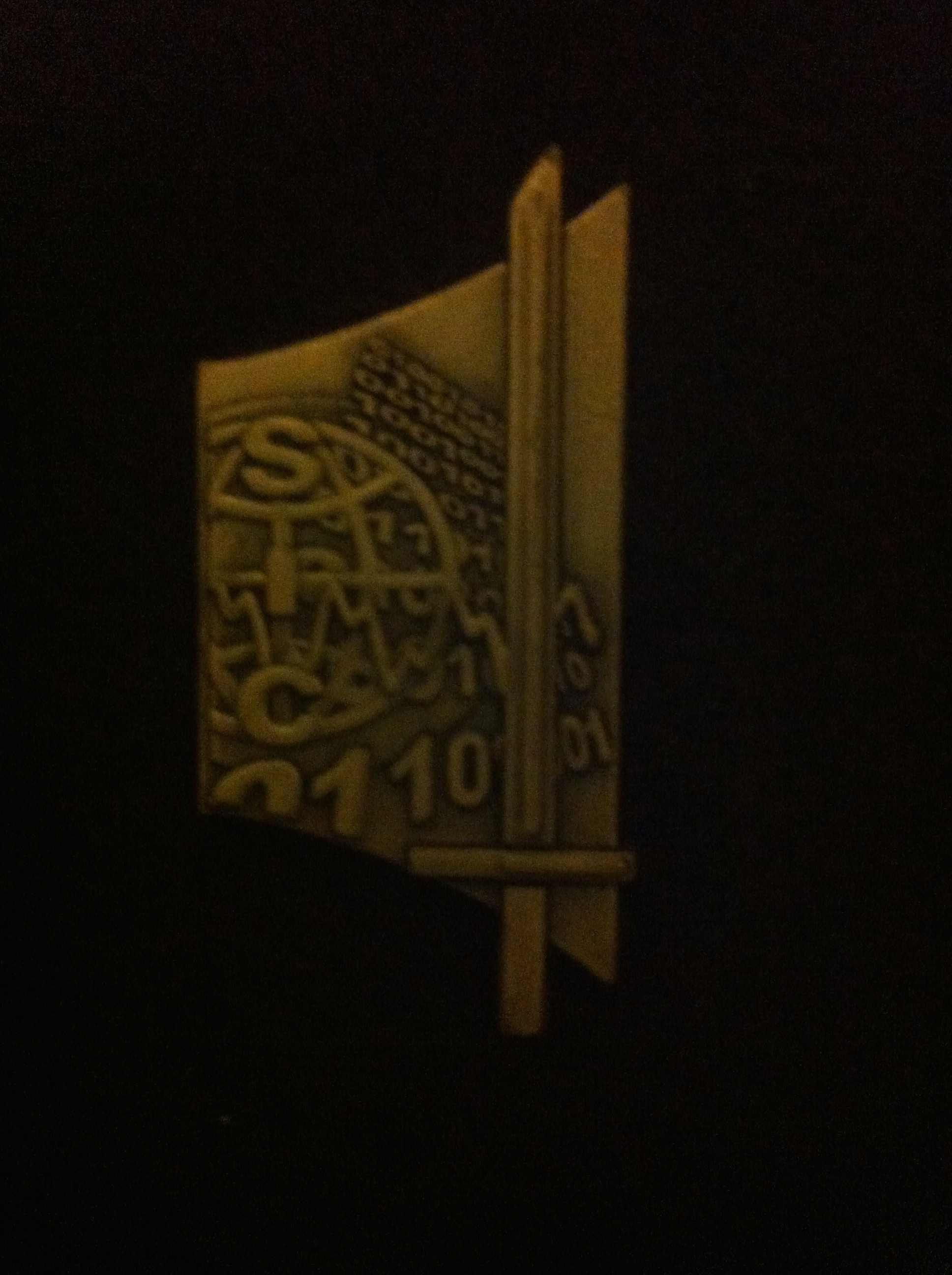 Insigne de qualifications SIC ( Transmissions de l'armée française )